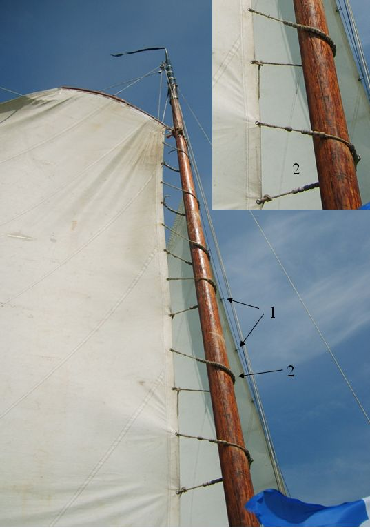 Picture showing connection of main sail on mast.